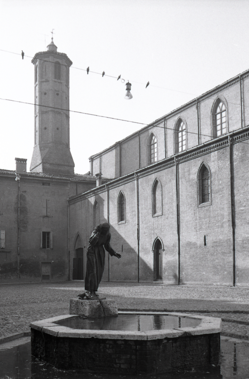 Modena. Centro storico: vedute urbane, portici, palazzi con particolari elementi architettonici. Chiesa di San Francesco:esterno con particolare del portale con lunetta affrescata e fontana con statua di San Francesco. Servizio fotografico : Modena, 1973 / Paolo Monti. - Strisce: 7, Fotogrammi complessivi: 36 : Negativo b/n, gelatina bromuro d'argento/ pellicola ; 35 mm. - ((Sul portanegativi: N[I]K[MA]T FP4. - Occasione: Campagna di rilevamento del centro storico. - Fonte: Agenda di Paolo Monti: Leica 1501-3000 Controllo numerazione (1950-1978), presso Archivio Paolo Monti. - Fonte: Monografia di Orlandi, Piero: Modena: il censimento fotografico dei centri storici, Bologna, IBC (1979)